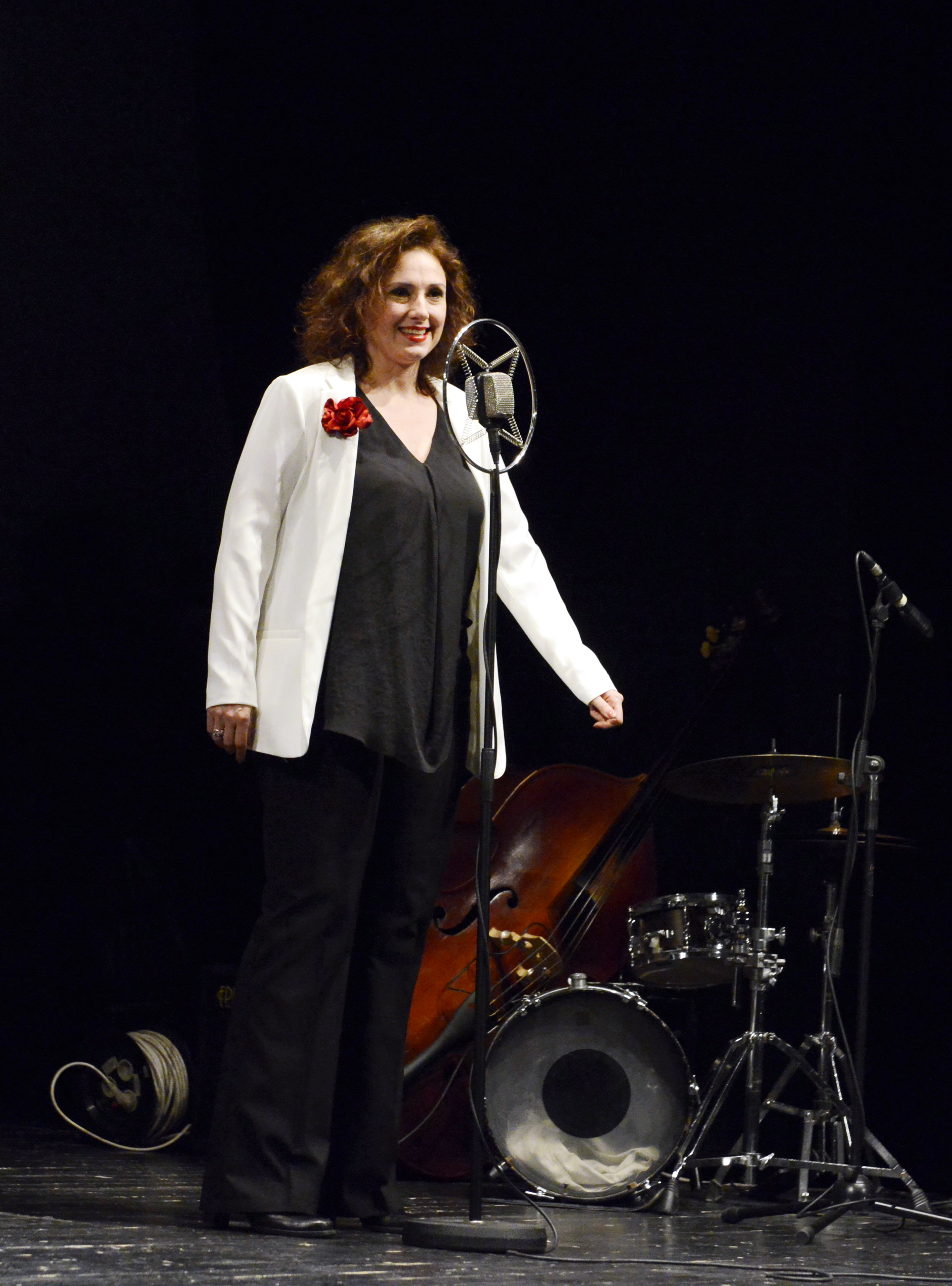 Zuzana Mauréry